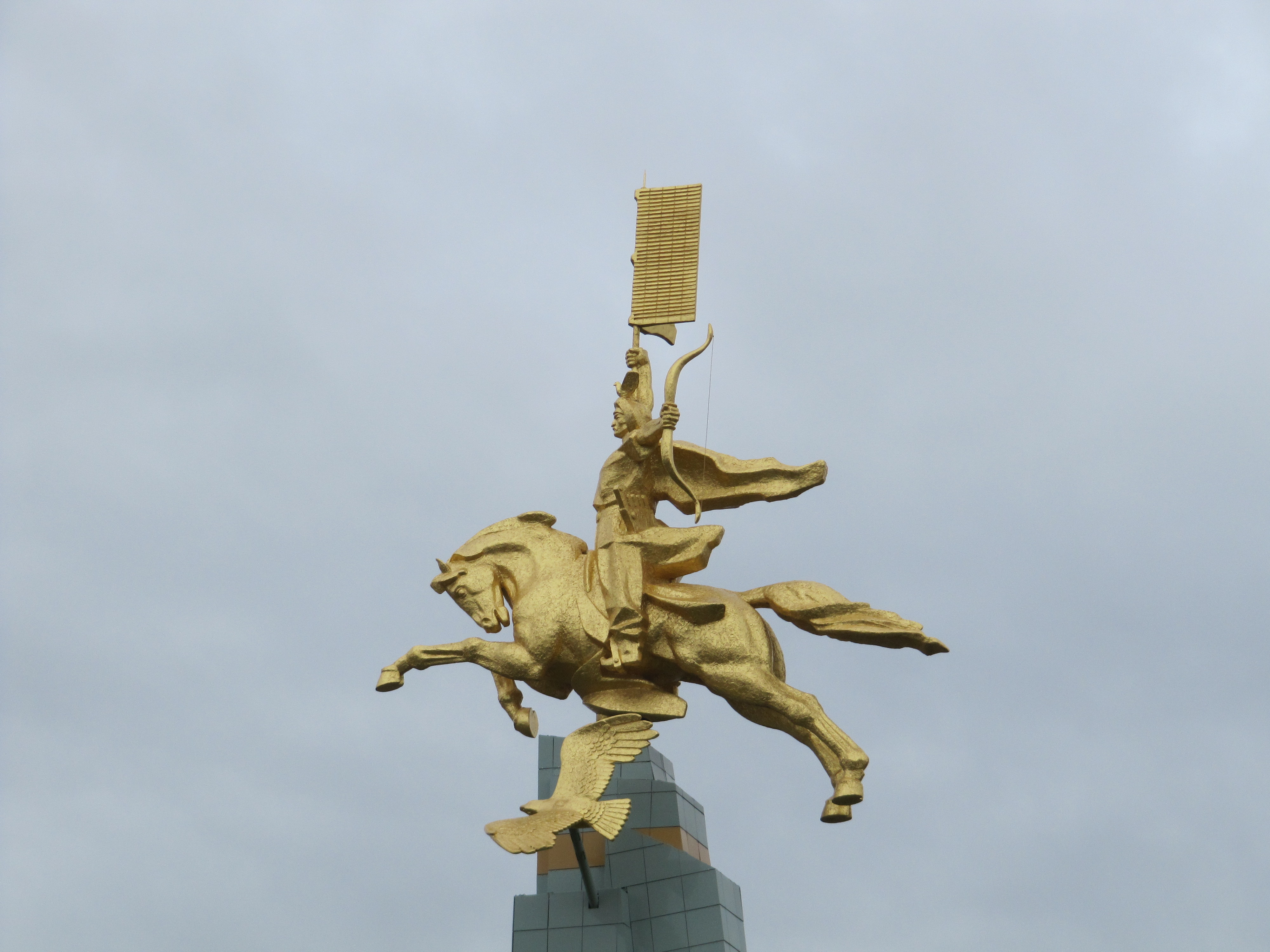 Памятник "Золотой всадник", Элиста, Калмыкия